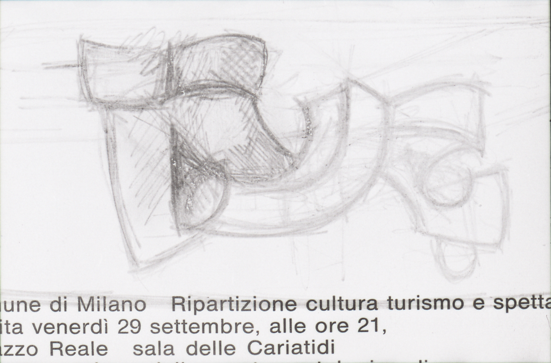 Servizio fotografico : Milano, 1972 / Paolo Monti. - Strisce: 2, Fotogrammi complessivi: 10 : Negativo b/n, gelatina bromuro d'argento/ pellicola ; 35 mm. - ((Sul portanegativi: NIKMAT FP4 e iscrizione documentaria manoscritta a penna nera "Mag[ggio] [19]73". - Occasione: Mostra antologica del 1972. - Fonte: Agenda di Paolo Monti: Leica 1501-3000 Controllo numerazione (1950-1978), presso Archivio Paolo Monti